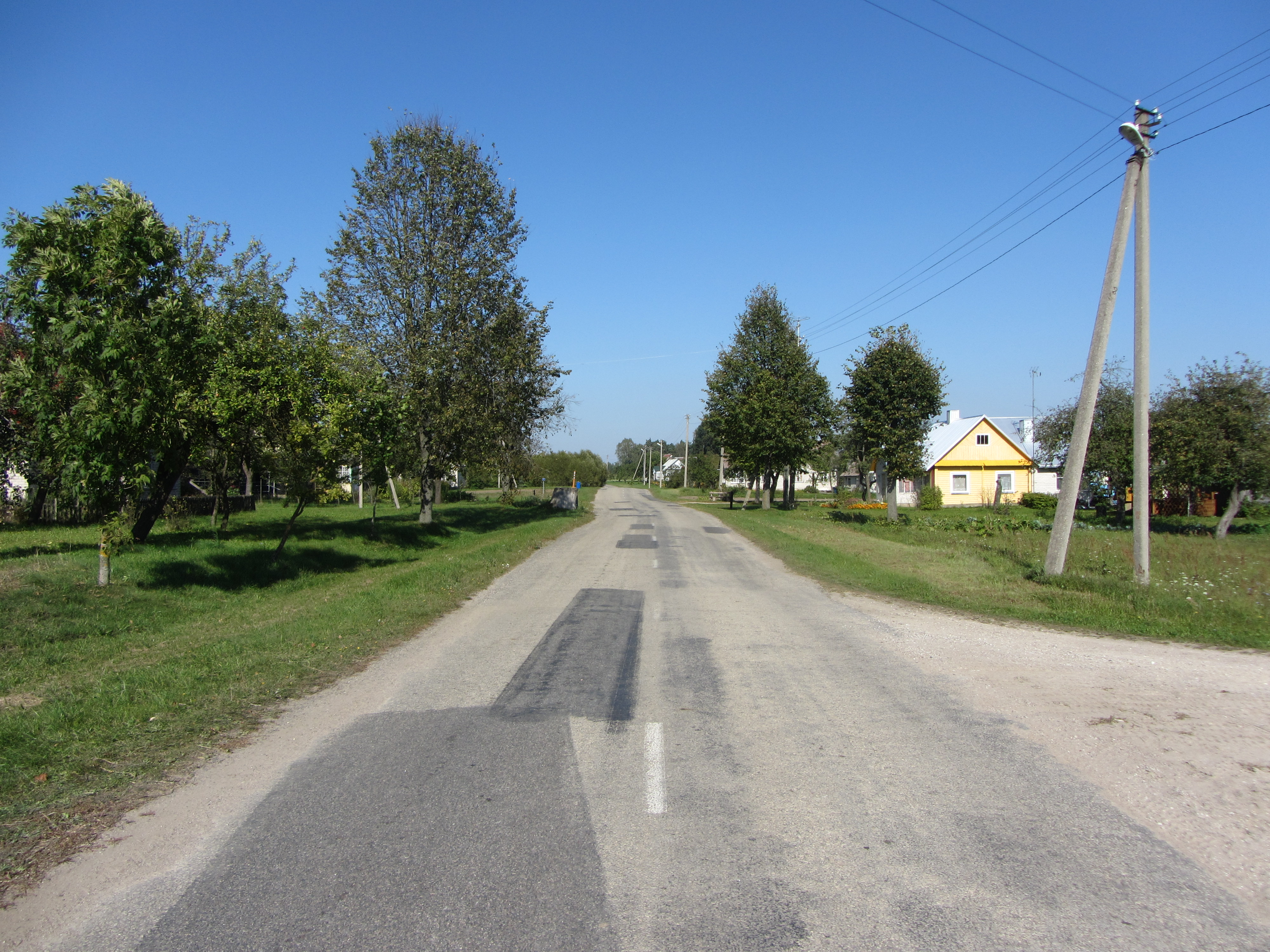 Kareivonys 65419, Lithuania